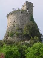 Torre di Acquapuza a Bassiano